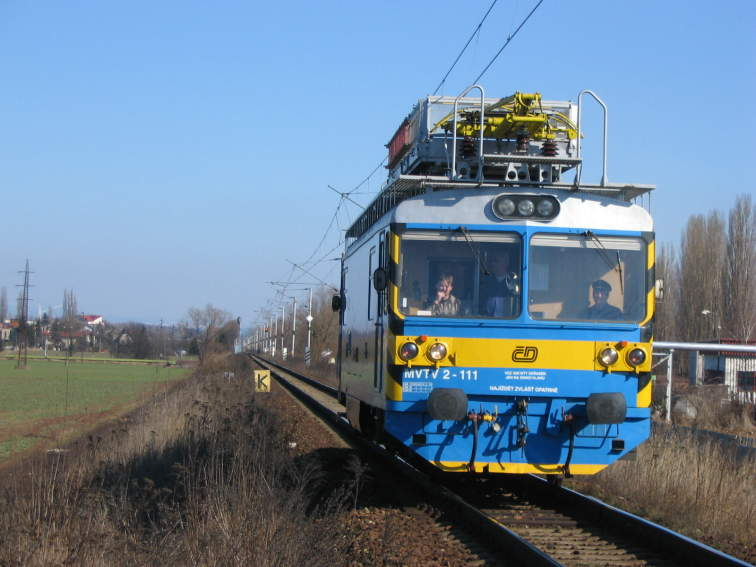 Lokomotiva řady 892, oblast Hradec Králové - most přes Labe